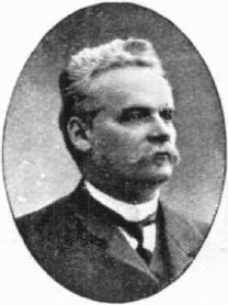 Richard Sievers (1852-1931), finländsk läkare